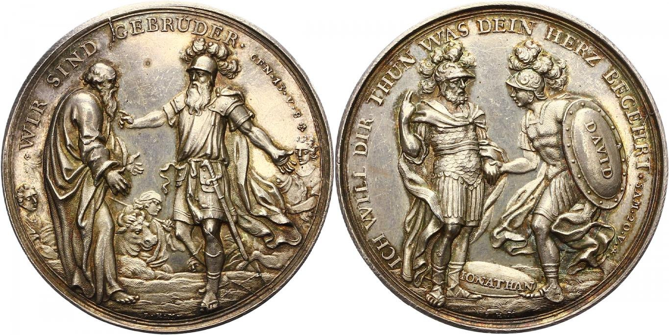 Медаль дружбы. Сюжет: Давид и и Ионафан, Абрахам и Лот. Медальер (автор штемпеля) Филипп Генрих Мюллер